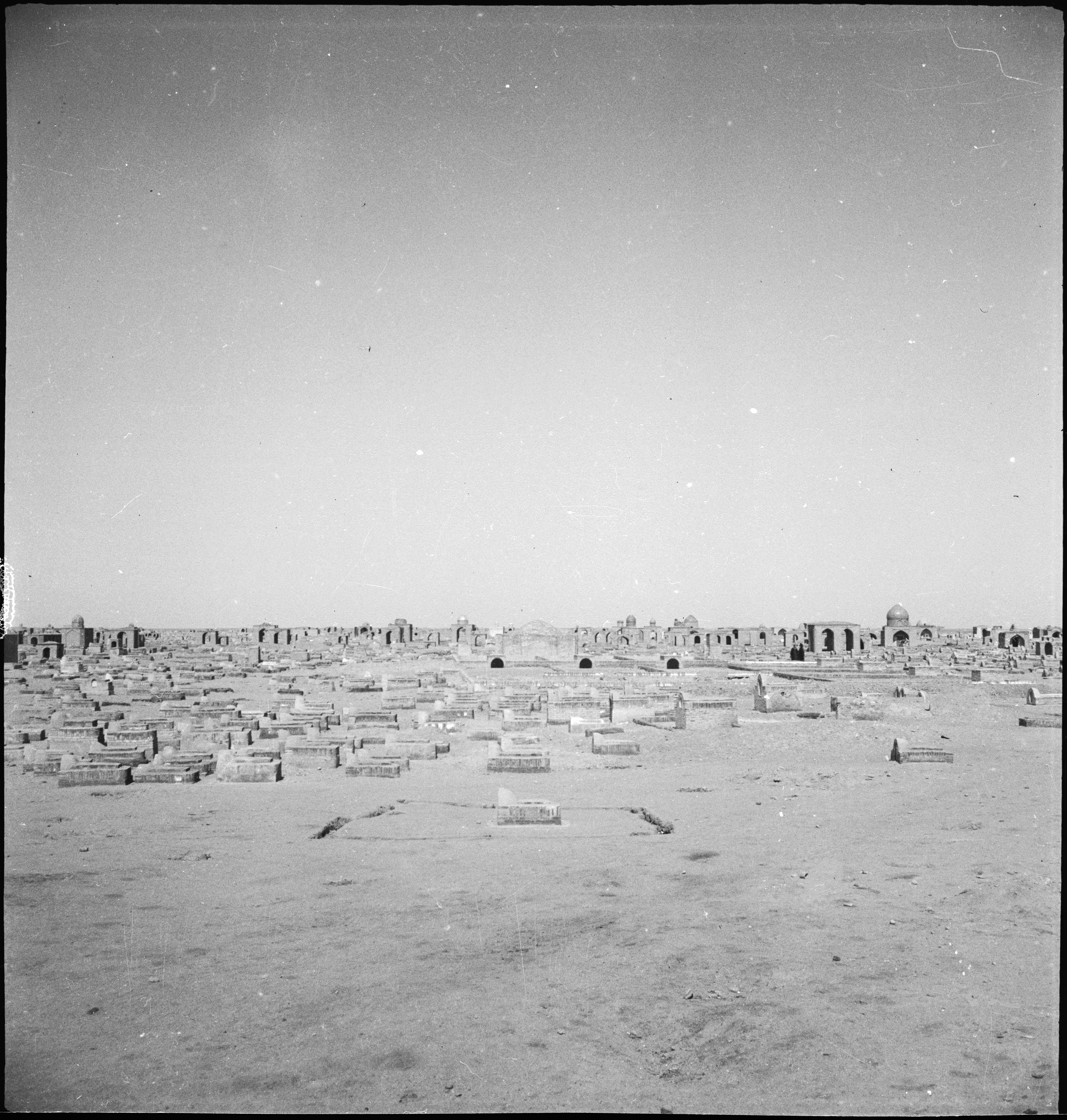 Irak, Nejaf (Nedjef): Wüstenfriedhof; Wüstenfriedhof